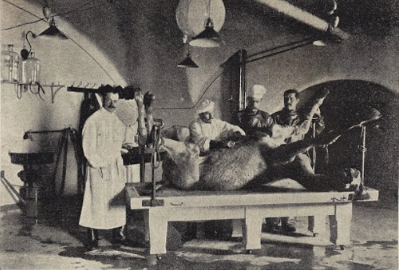 Операционная противочумной лаборатории. Вскрытие зачумлённого верблюда